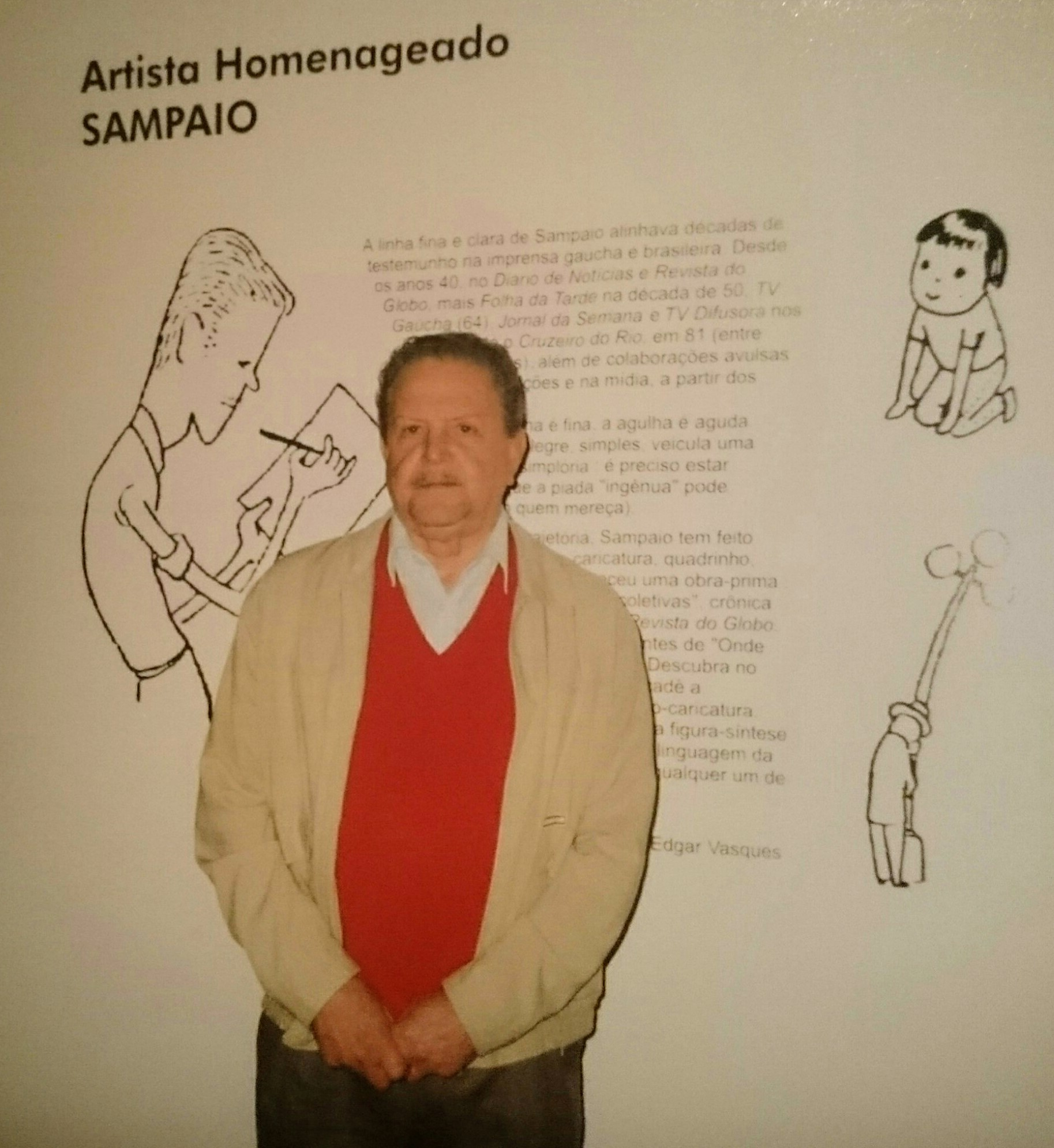 José Miguel Pereira de Sampaio - Artista homenageado do XI Salão Internacional de Desenho para a Imprensa de Porto Alegre, em 2004